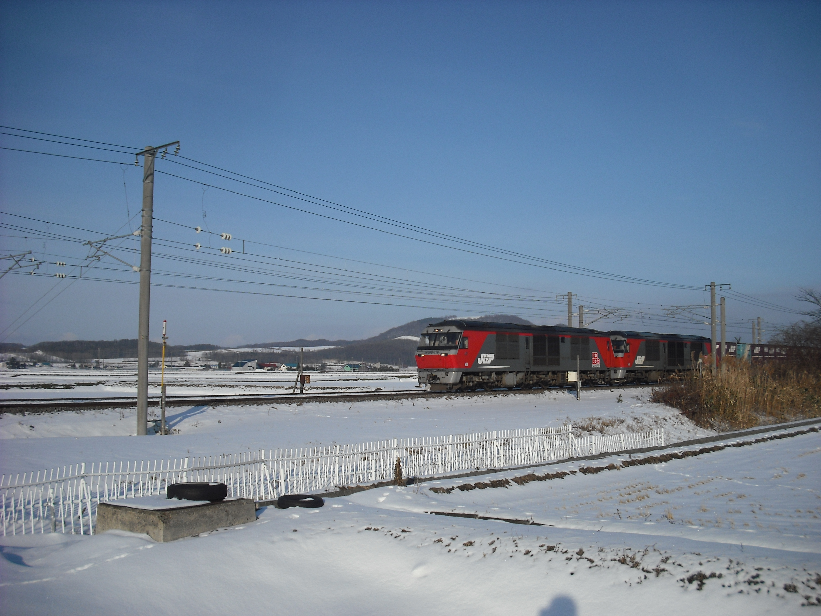 函館本線を重連で走行するDF200貨物列車